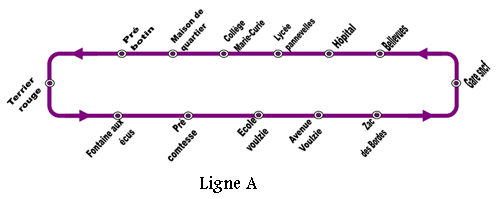 Image de la ligna a